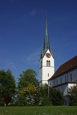 Kirche von Muri (Nr. 03.1-4499)